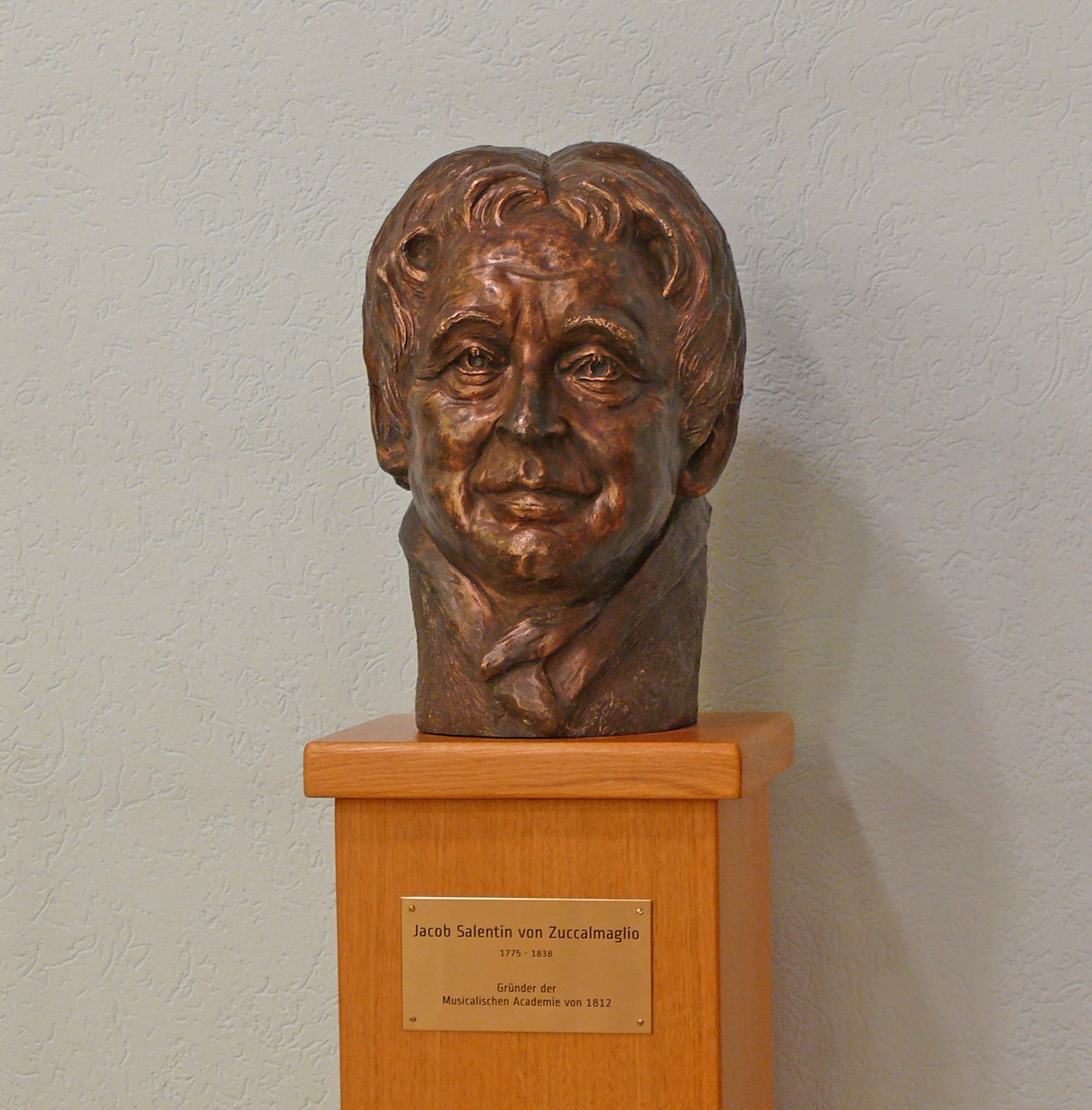 neue Bronzebüste von Zuccalmaglio im Haus der Kunst in Burscheid zum 200jährigen Bestehen der Musicalischen Academie